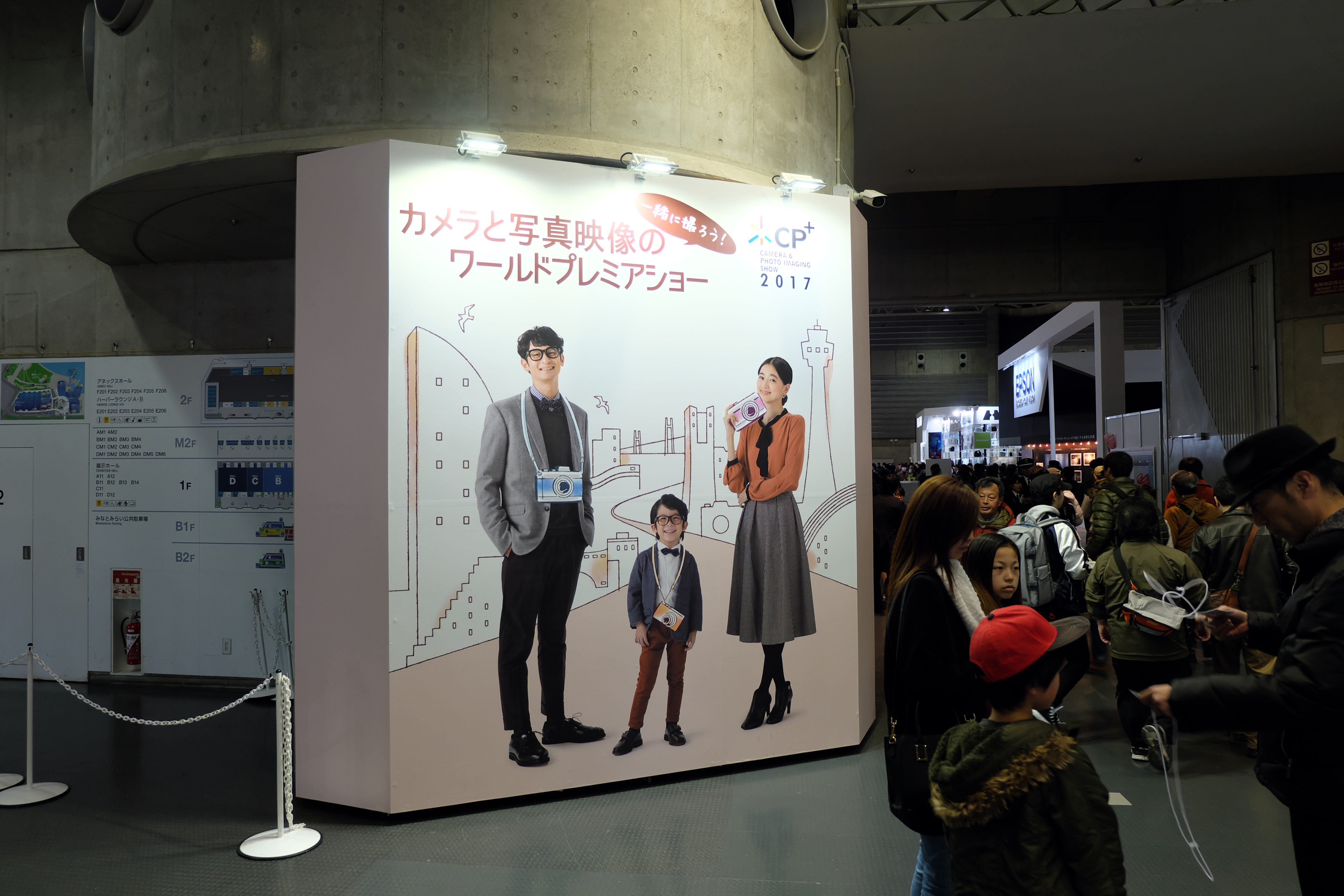 CP+2017の入口ボード